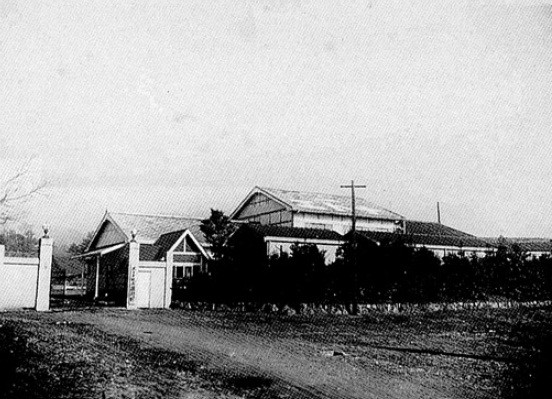 エトナ映画京都撮影所（御室撮影所）、1935年の写真